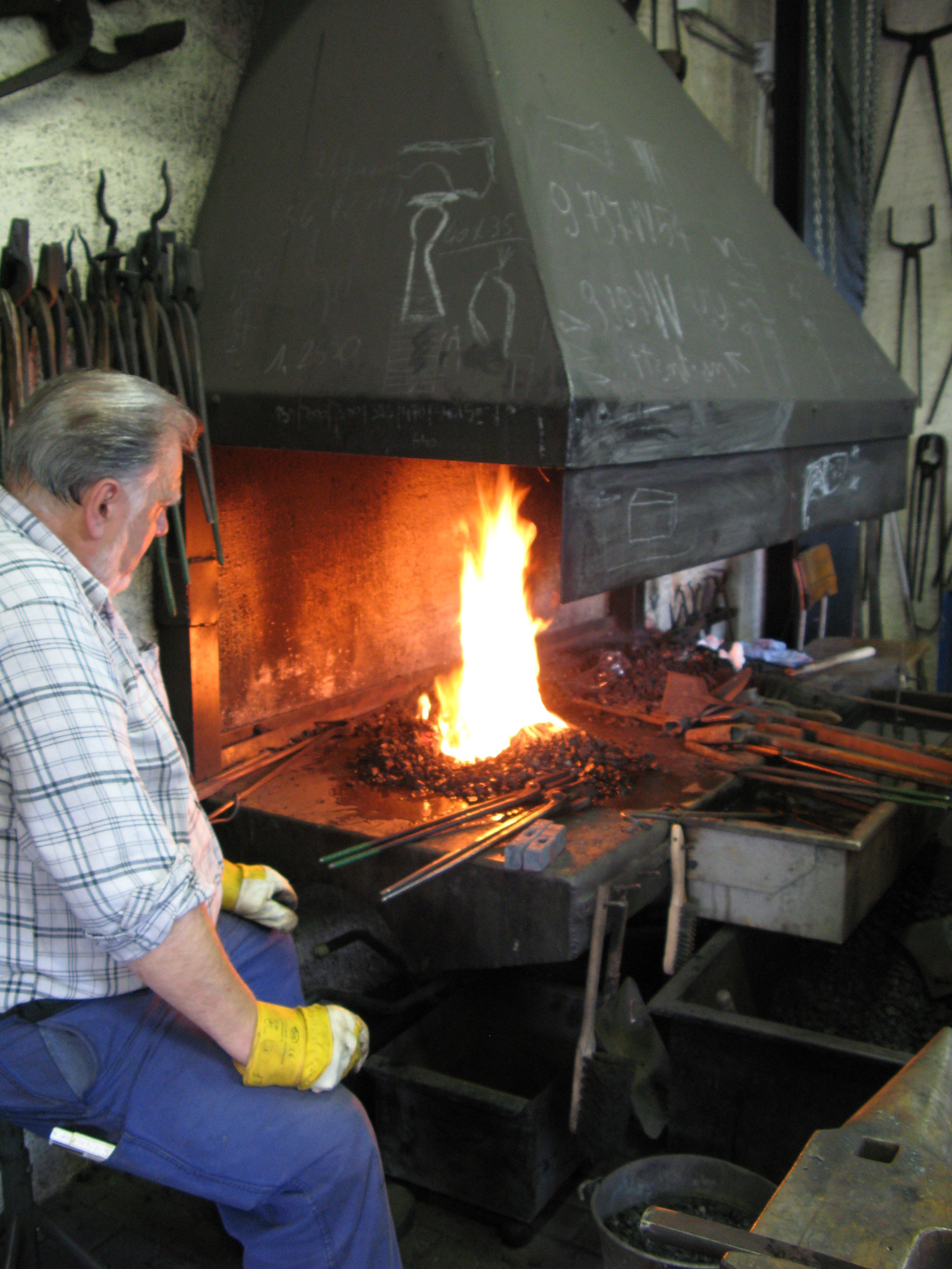 Schmëdd zu Rëmeleng.